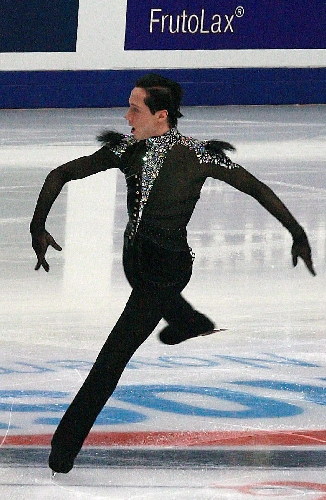 Джонни Вейер на Кубке Ростелекома 2012. Короткая программа.